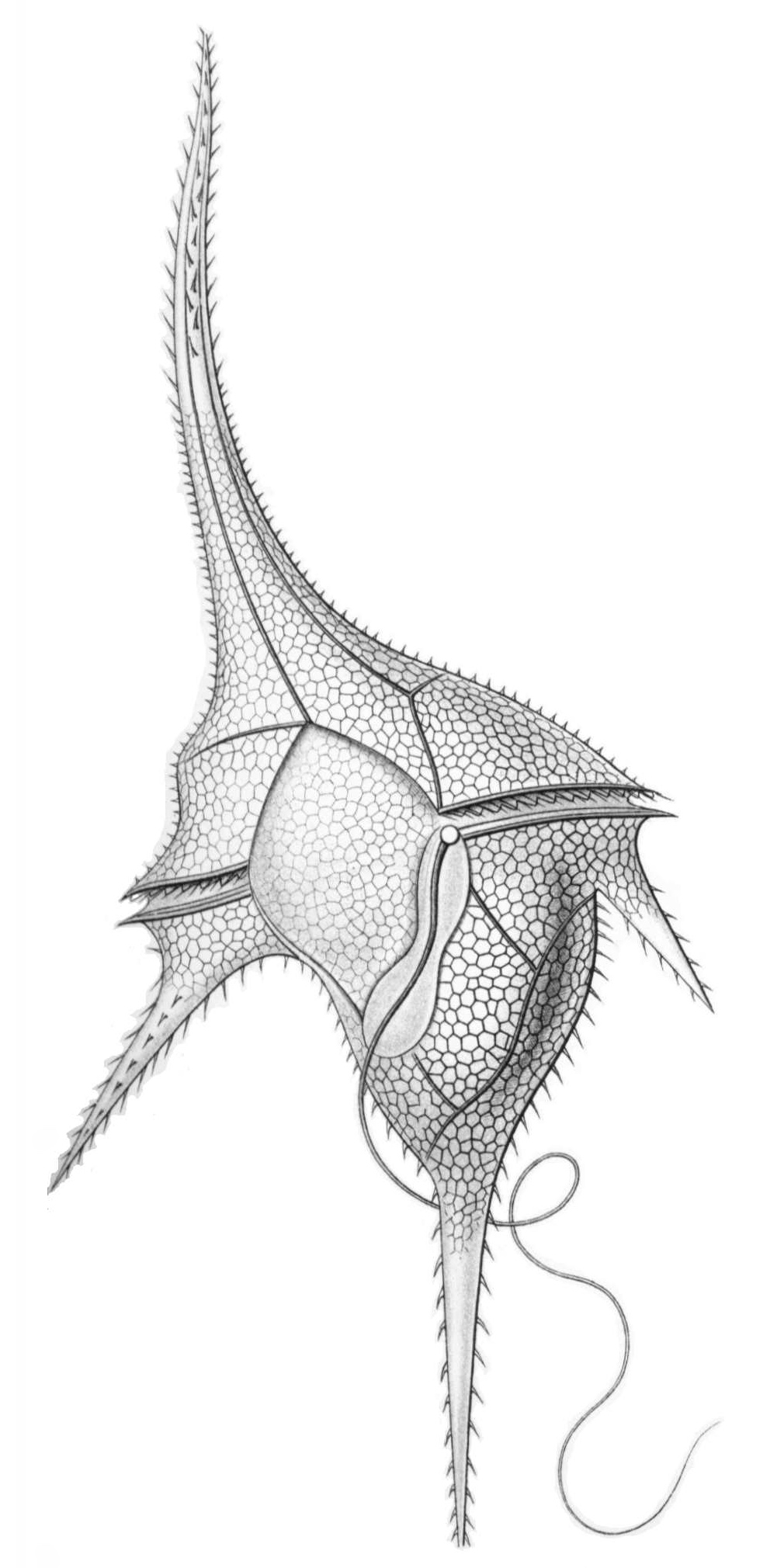 Ceratium hirundinella (O.F.Müller) Dujardin